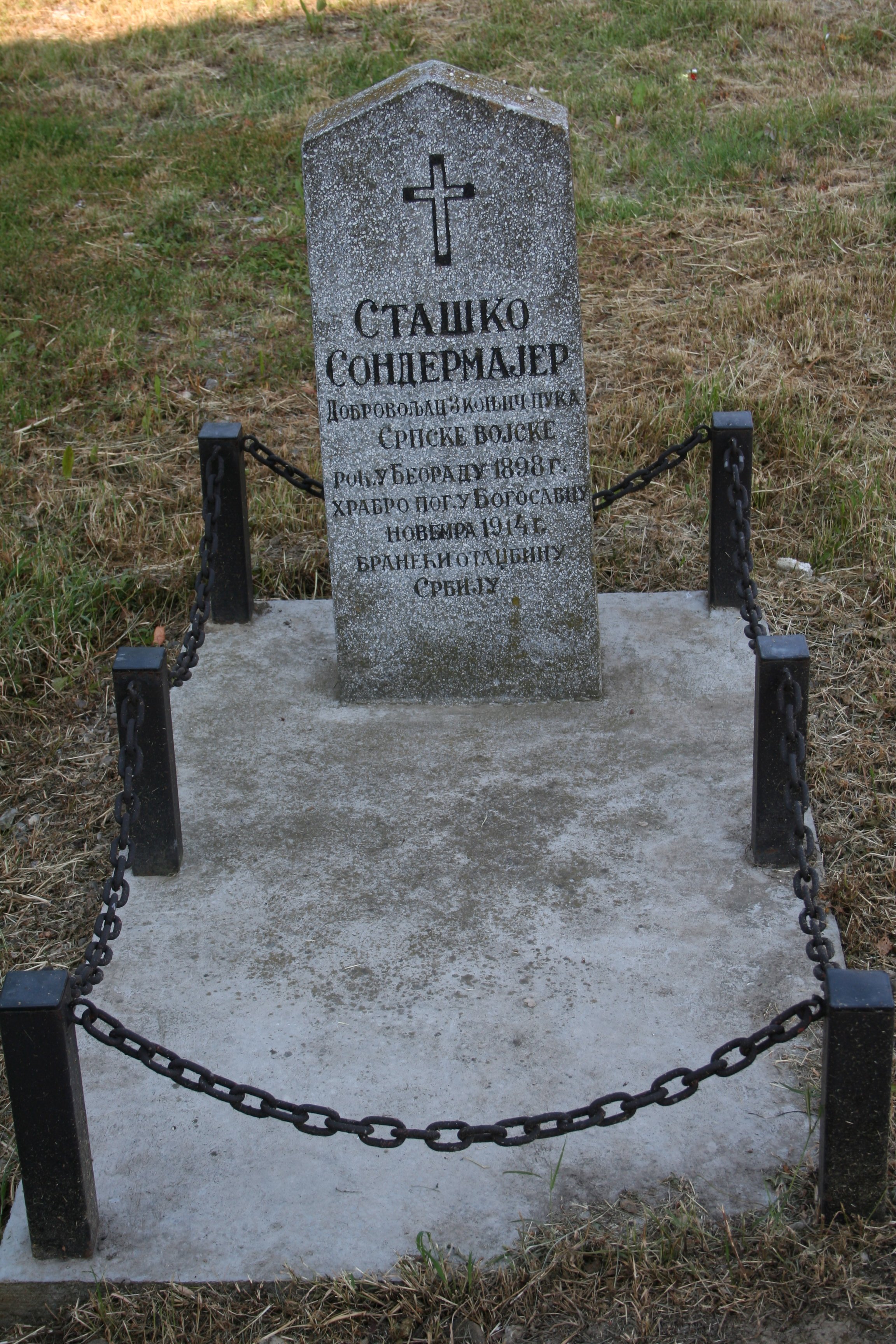 Dom kulture, Bogosavac